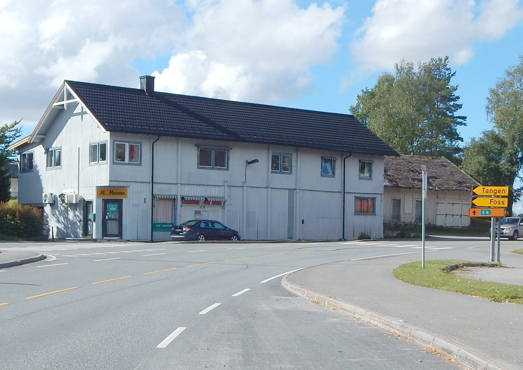 Tettstedet Gata i Vallset